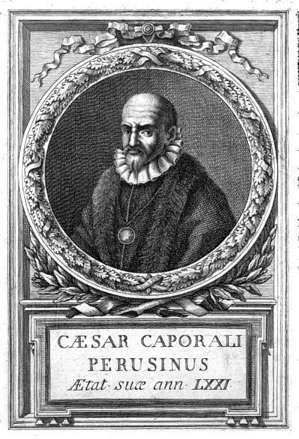 Ritratto di Cesare Caporali inserito come tavola n.n. in Rime di Cesare Caporali perugino, Perugia, Riginaldi, 1770